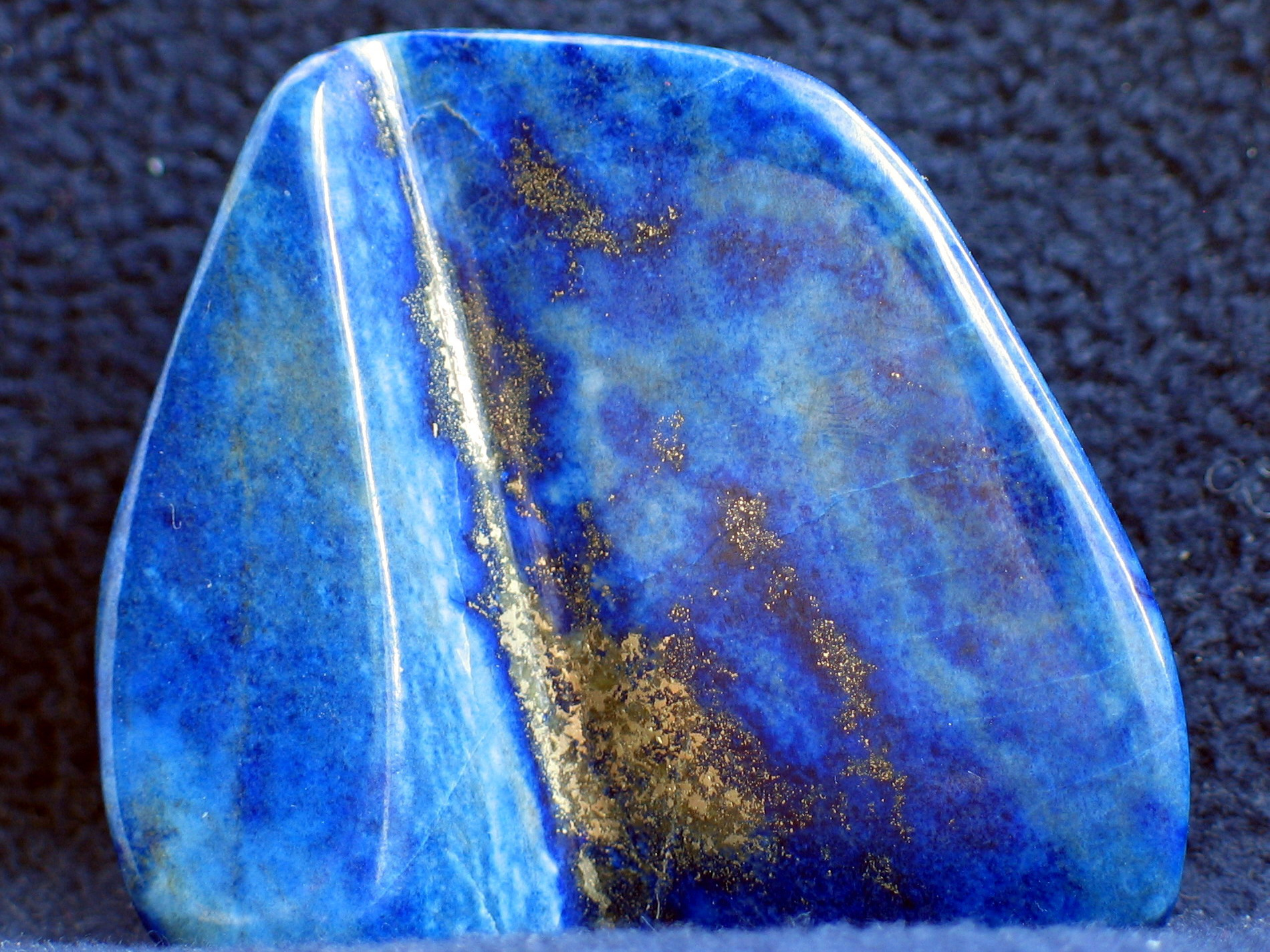 Lazuryt - prowincja Badakshan, Afganistan.